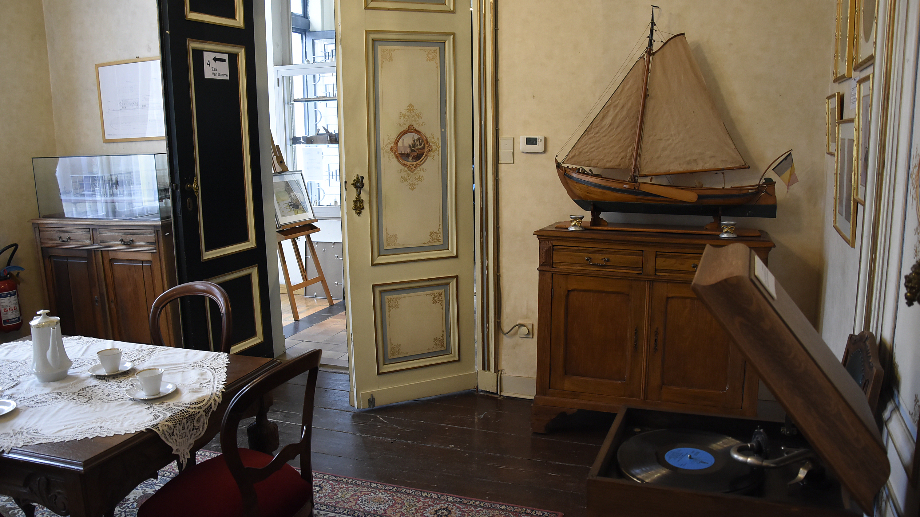 Scheepvaartmuseum Baasrode - Koninkllijk Salon